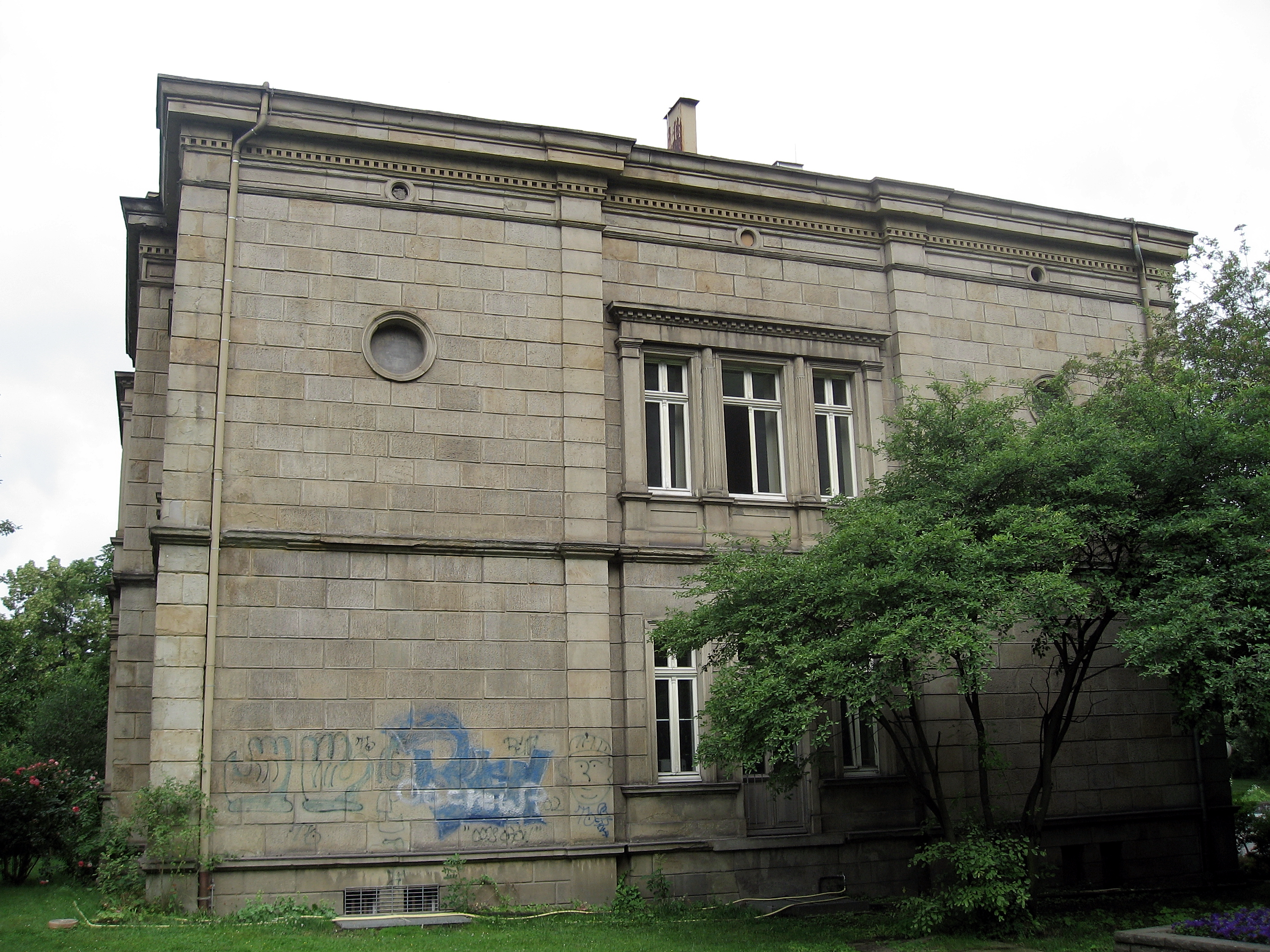 Villa Friedrich Lohmann senior, Ruhrstraße 91 in Witten Lage: Park des von der Familie Lohmann als Fabrik und Wohnhaus genutzten Hauses Witten, 1803-1848 Besitz Carl Lohmanns, nach dessen Tod 1810-1893 im Besitz des Neffen Friedrich Lohmann sen. Im 2. Weltkrieg zerstört, 1962 reduziert wieder aufgebaut, heute Standesamt und VHS; im Umfeld Stadtpark mit Erbbegräbnis der Familie Lohmann, Parkseite